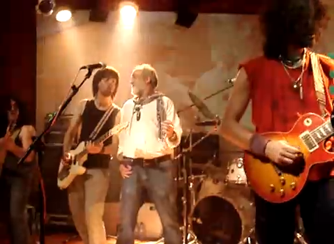 Banda Inconscientes tocando con Manolo Chinato.